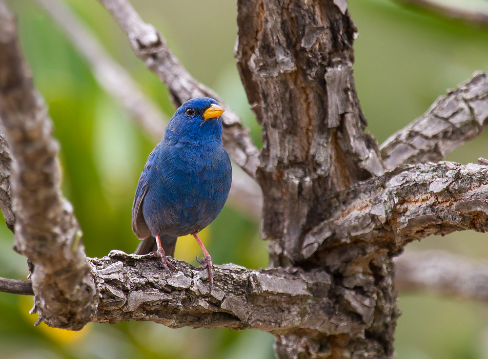 Captólio-MG